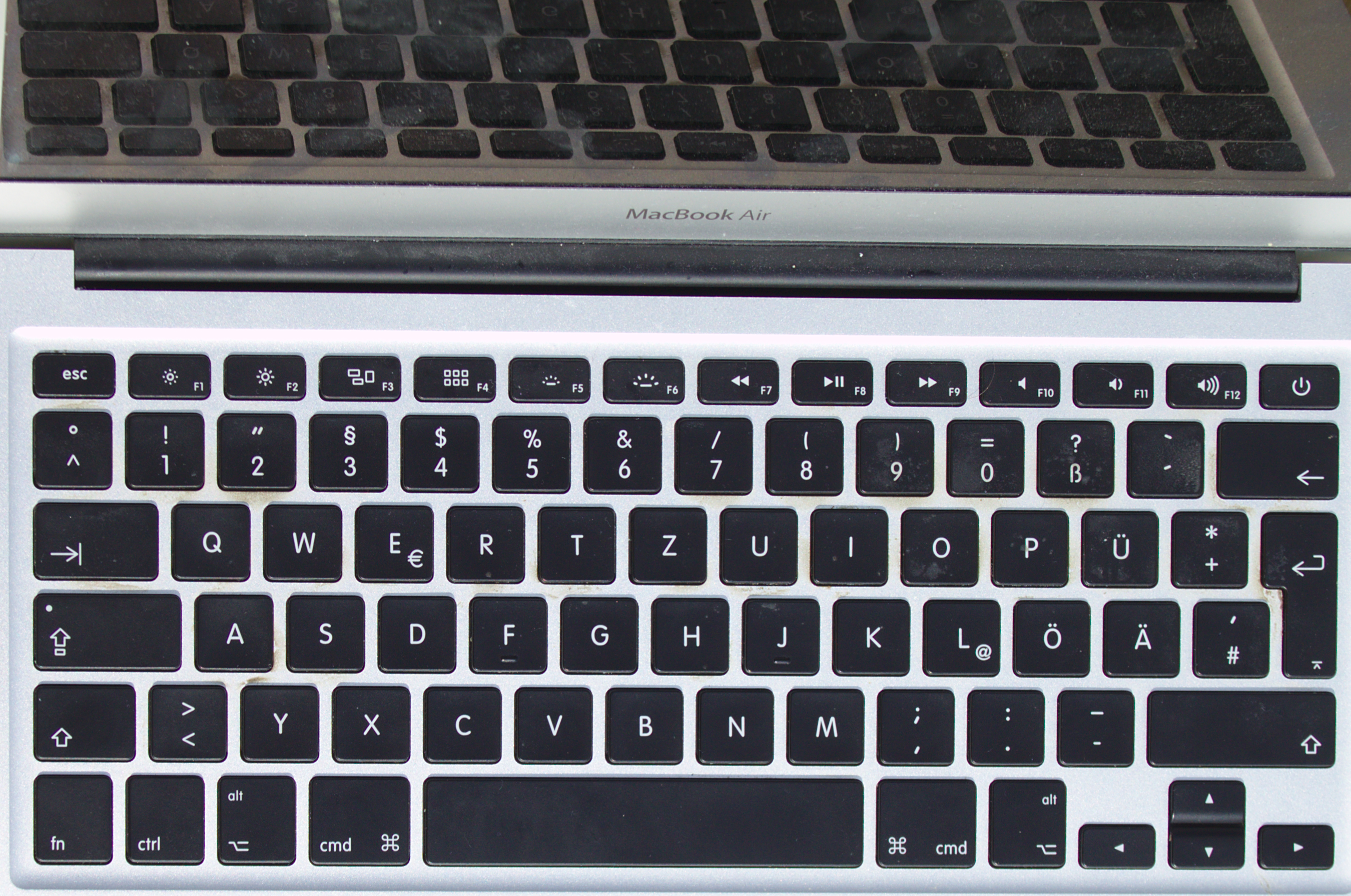 Tastatur eines MacBook Air von Mitte 2012, deutsche (QWERTZ-)TastenbelegungEsperanto: Klavaro de MacBook Air de mez-2012, germana (QWERTZ)-klavaranĝo